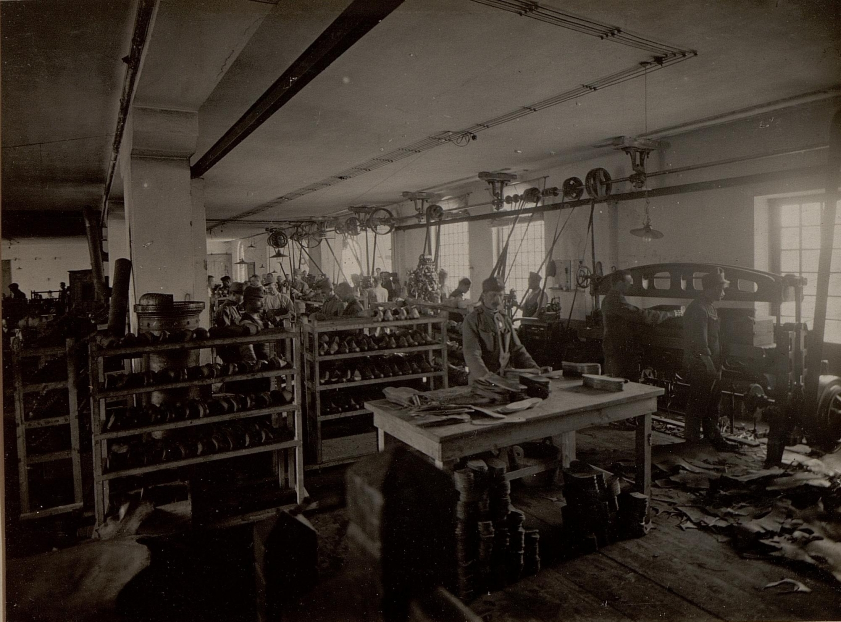 Etappenmontur Magazin in Klagenfurt. Goiserer Bergschuhwerkstätte. Beflockmaschine.